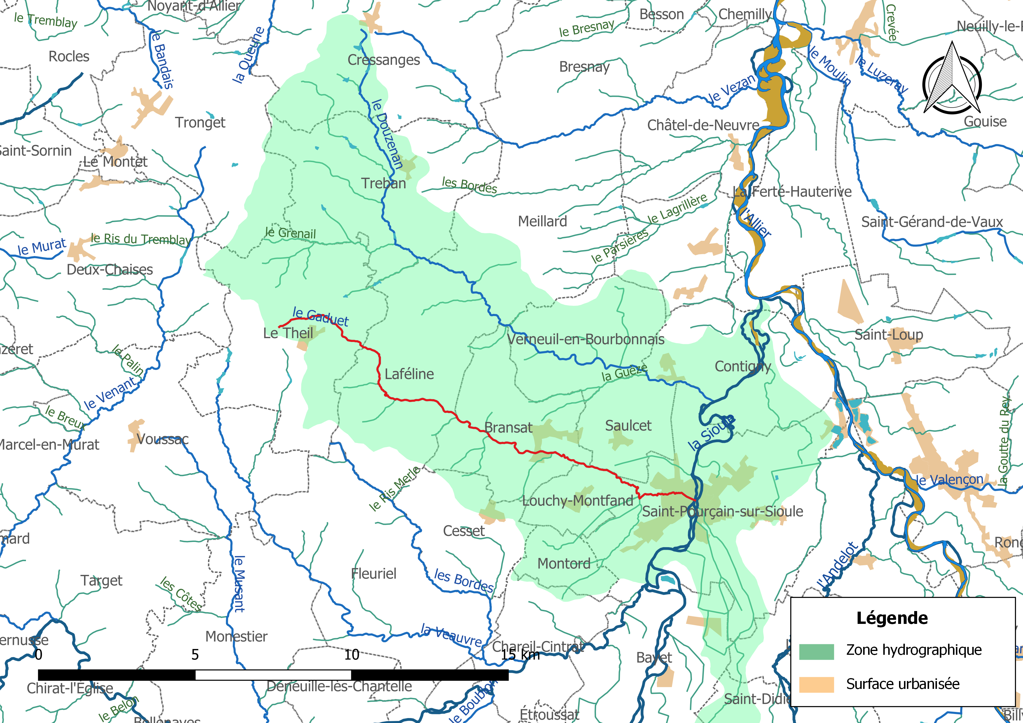 Carte du cours d'eau « le Gaduet » (France) et de la zone hydrographique dans laquelle il s'insère.